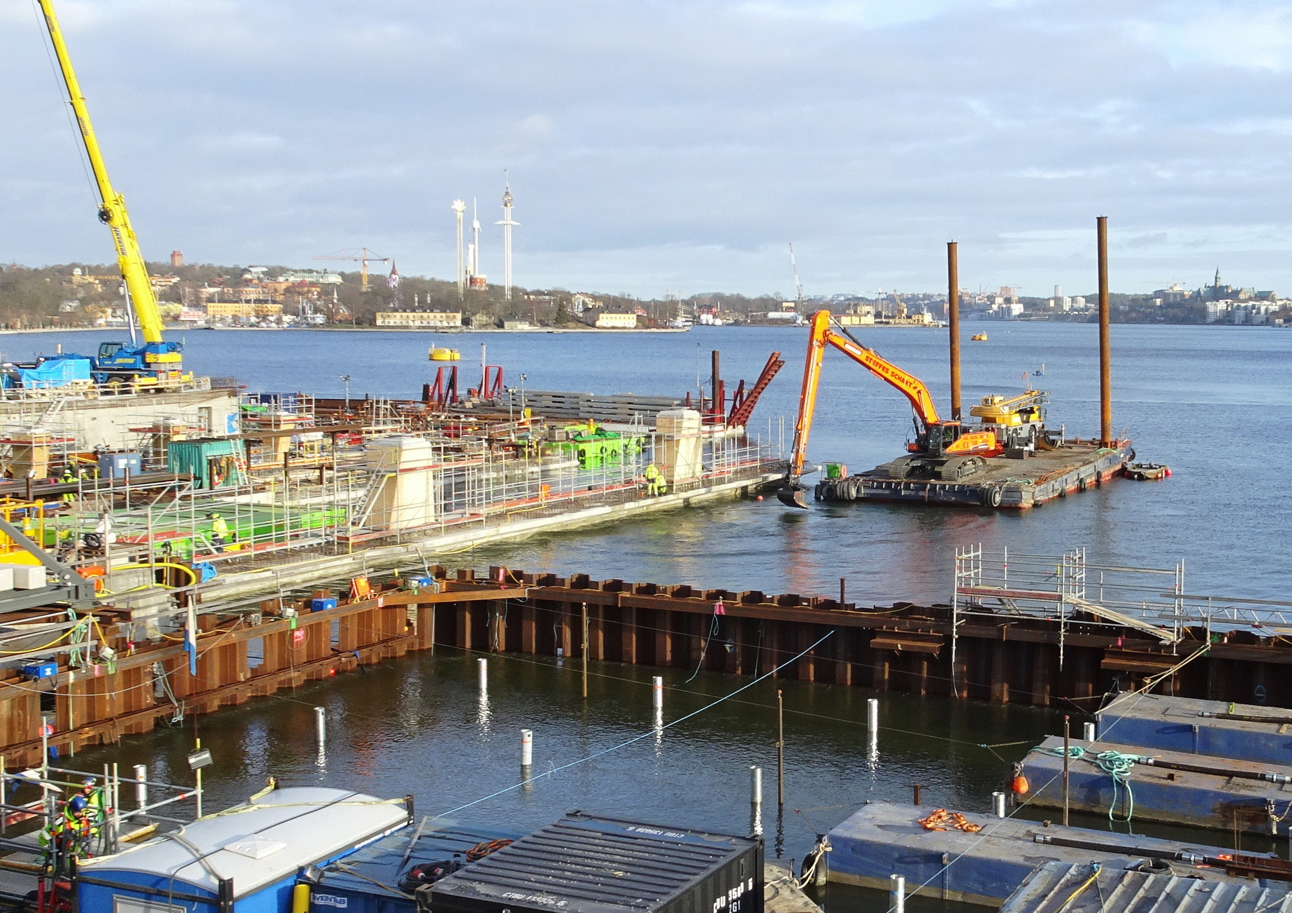 Nya Slussen, vy österut, arbeten med brofästen för nya huvudbron